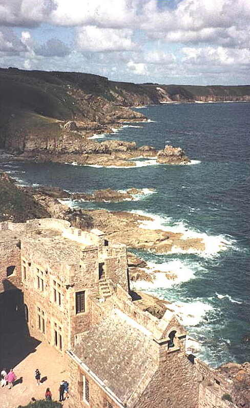 Fort-La_Latte an der Bretagne